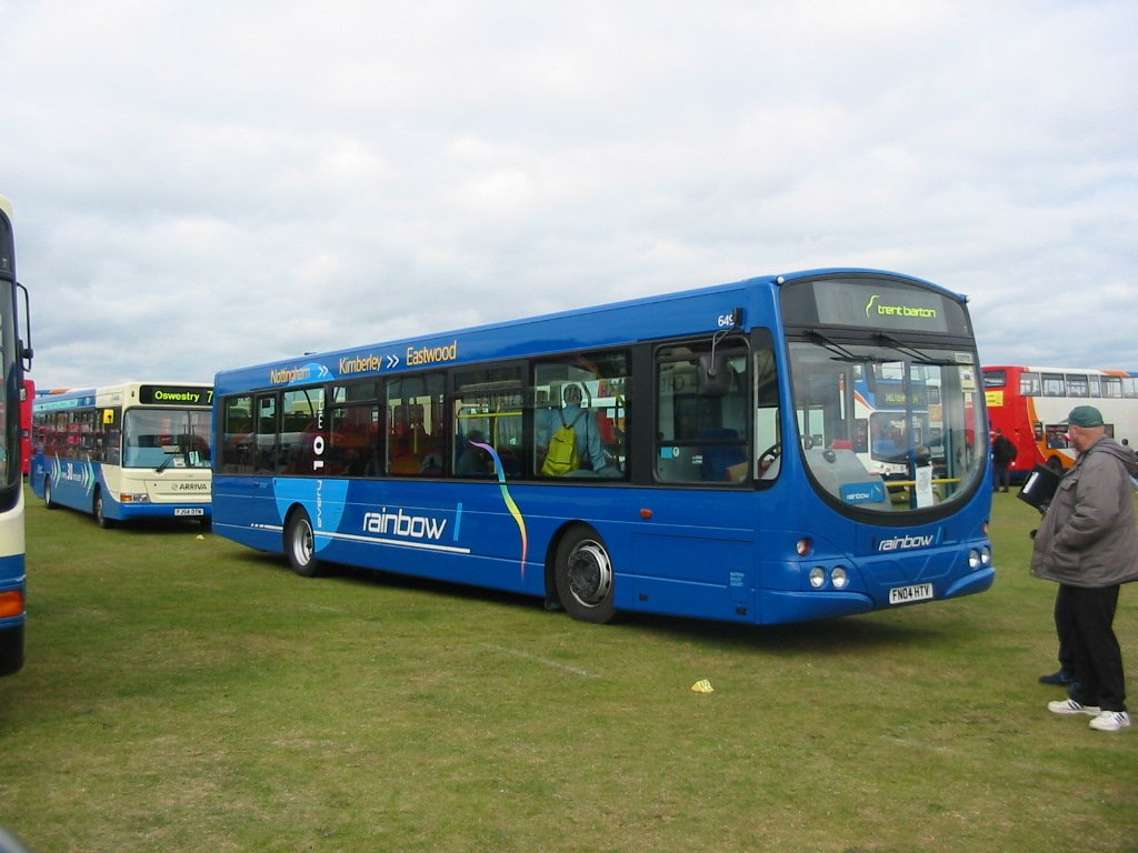 Trent 645 FN04HTV